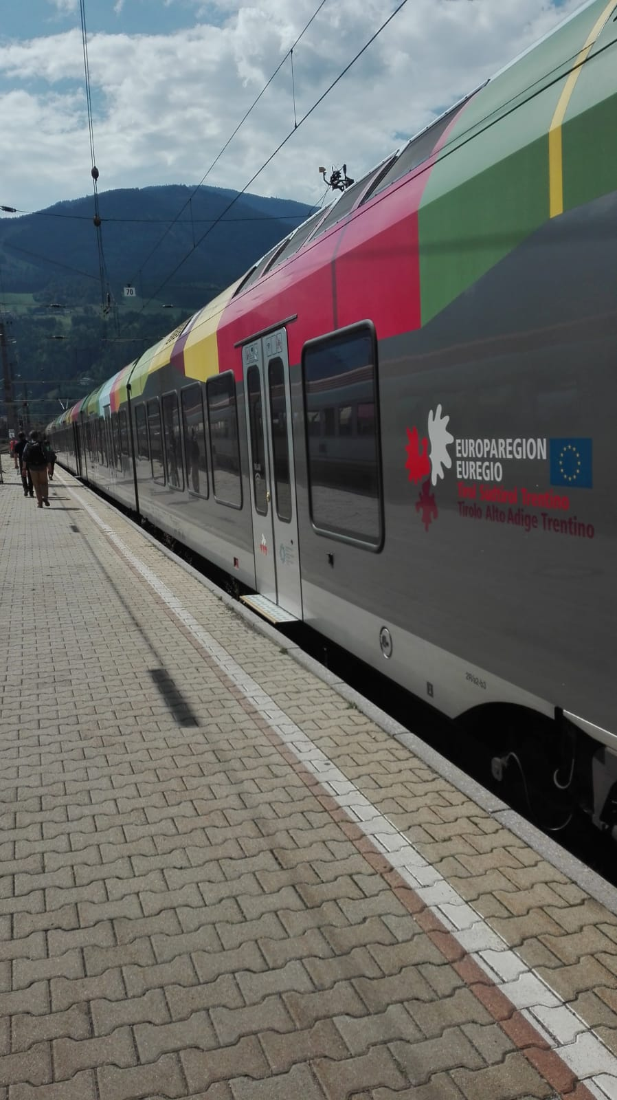 Logo Euregio irolo-Alto Adige-Trentino su treno SAD in servizio nella Val Pusteria